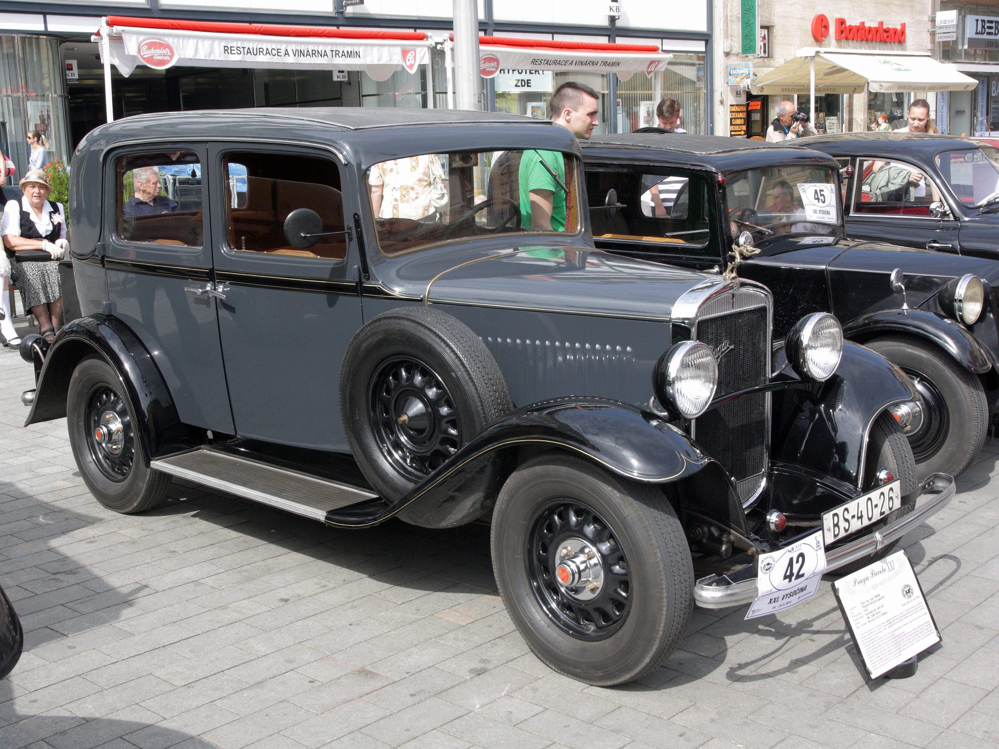 Brno, náměstí Svobody - start XXI. Srazu historických vozidel Vysočina 2014. Praga Piccolo XXI. série, r.v. 1932.